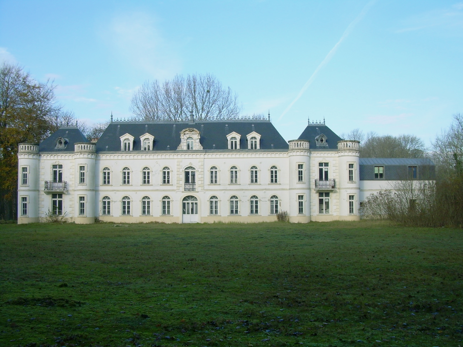 Parc naturel régional des Caps et Marais d'Opale - Côte d'Opale - dunes du Mont Saint Frieux - Château de DANNES